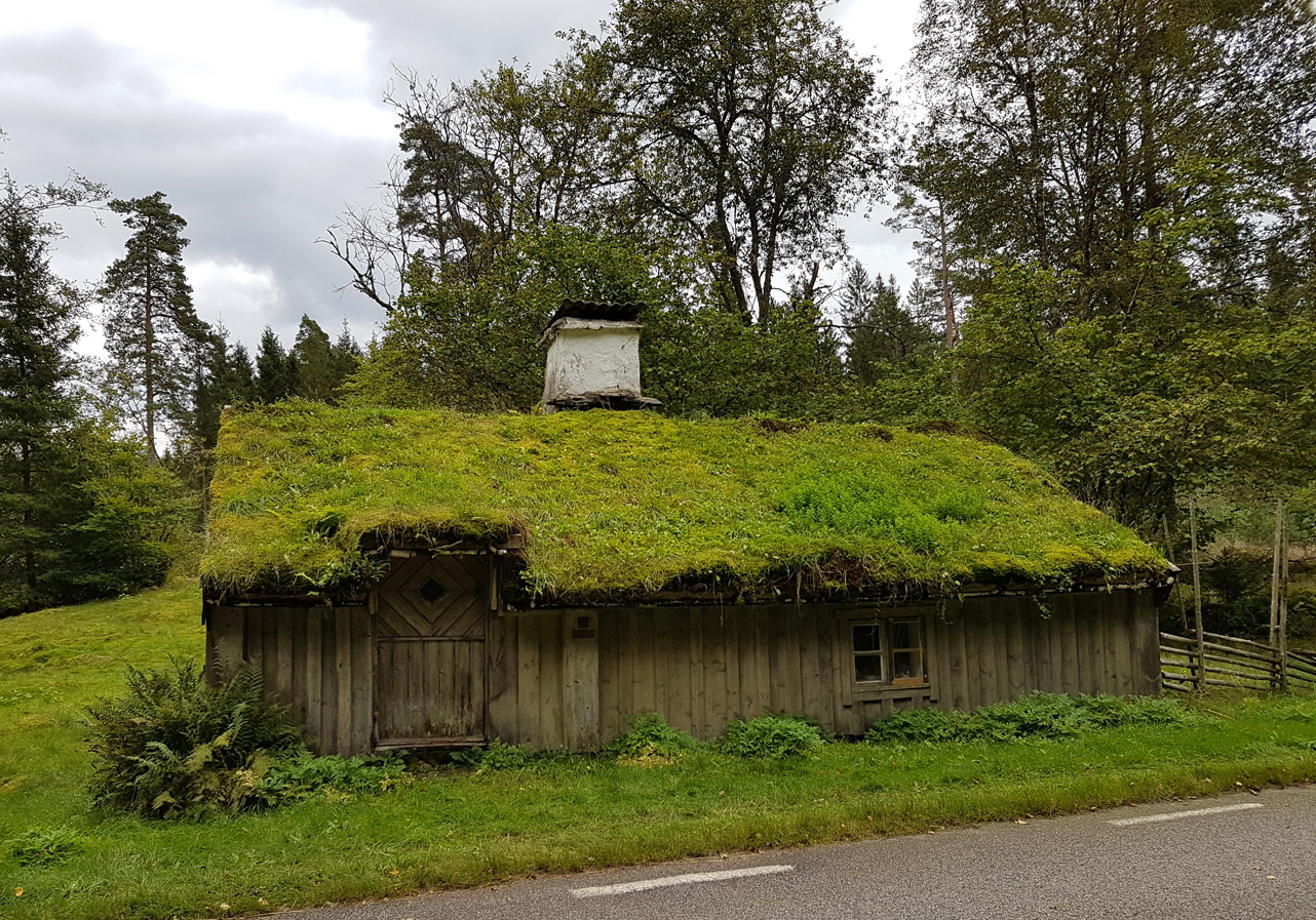 Lurehus sedan 1961 hörande till Breareds kulturhistoriska förening